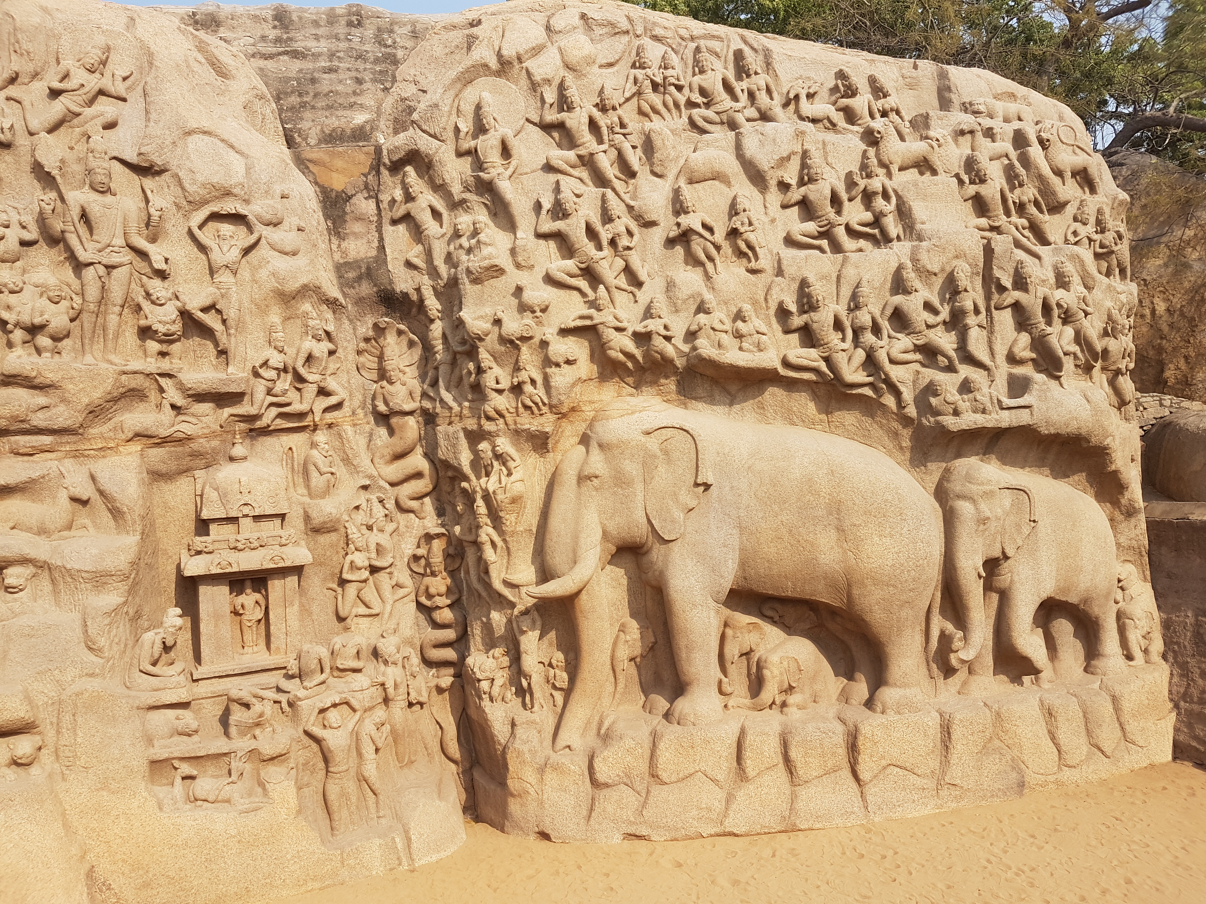 Arjunas Penance